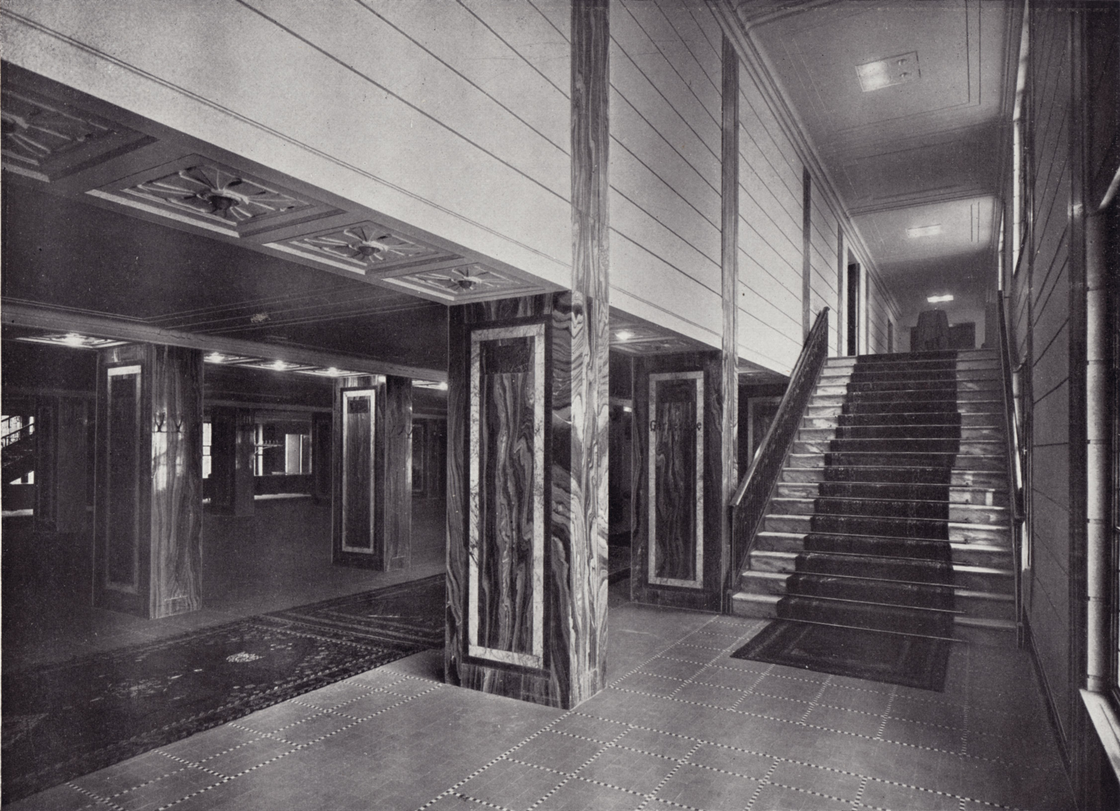 Berlin - Weinhaus Rheingold, Café im Garderobenvestibül mit Treppe zum Kaisersaal